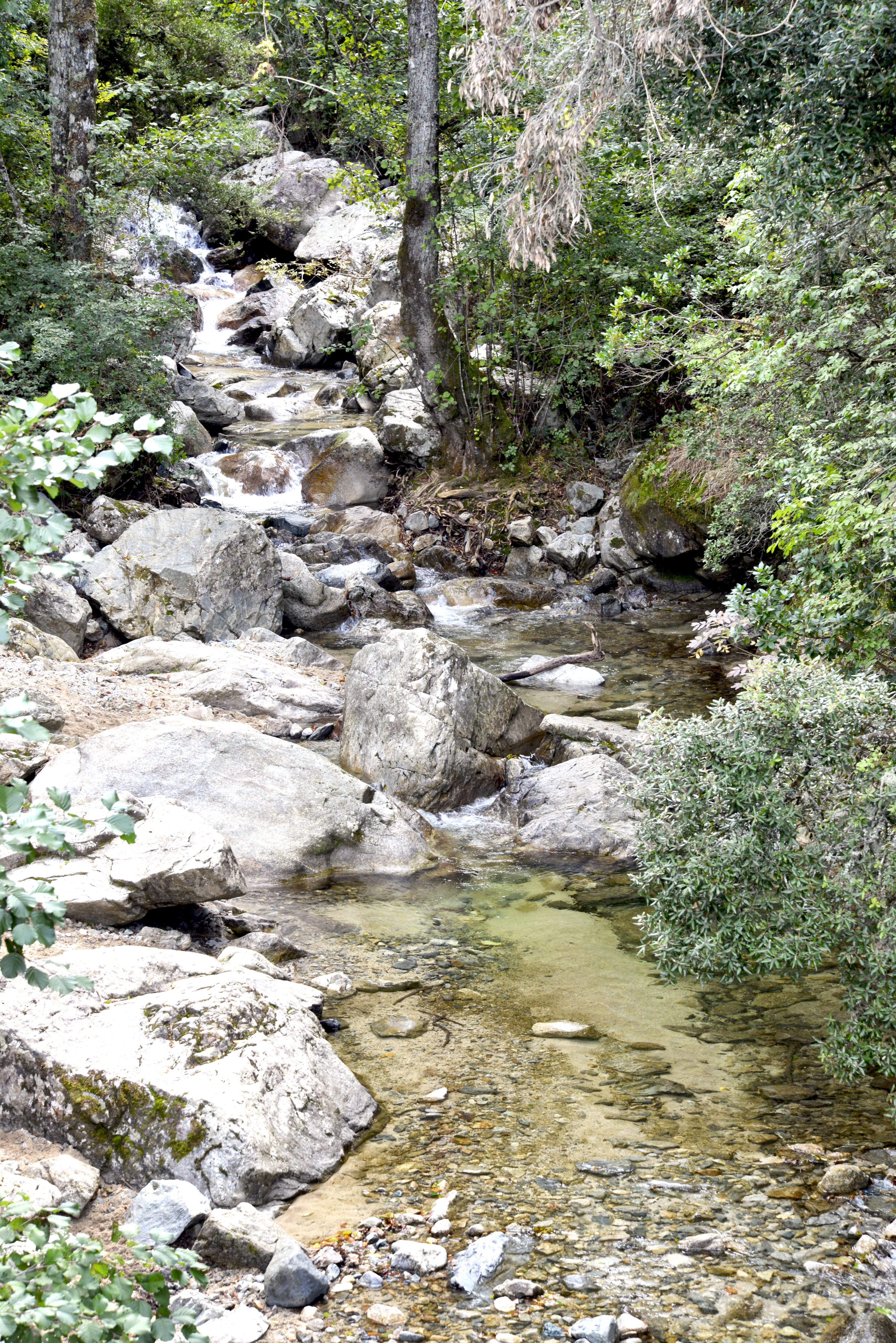 Bocognano, Gravona (Corse) - Le ruisseau de Trotto, affluent du ruisseau de Piana qui alimente la Gravona, en amont du pont de Salicio de la route D27.